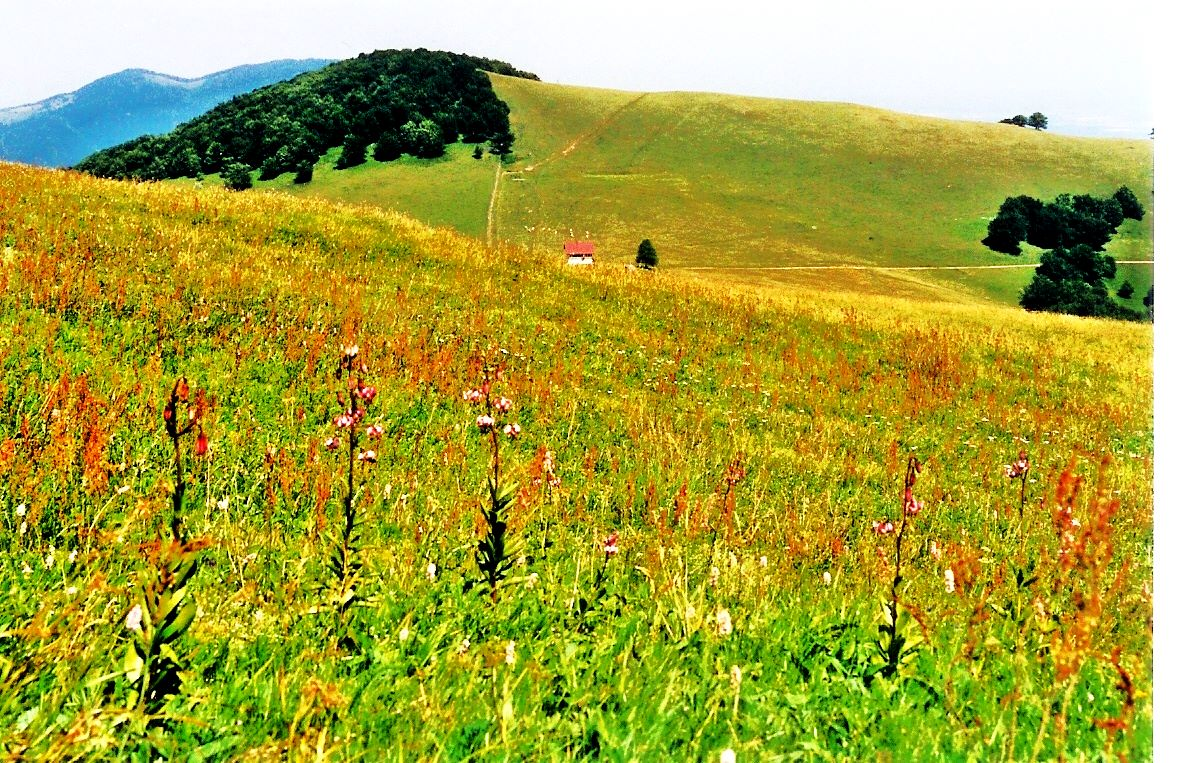 Sommet du Thaner-Huebel, vu du Rossberg.